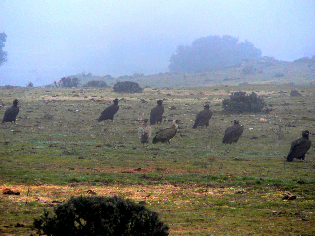 6 Aegypius monachus + 2 Gyps fulvus - norte de Madrid - España